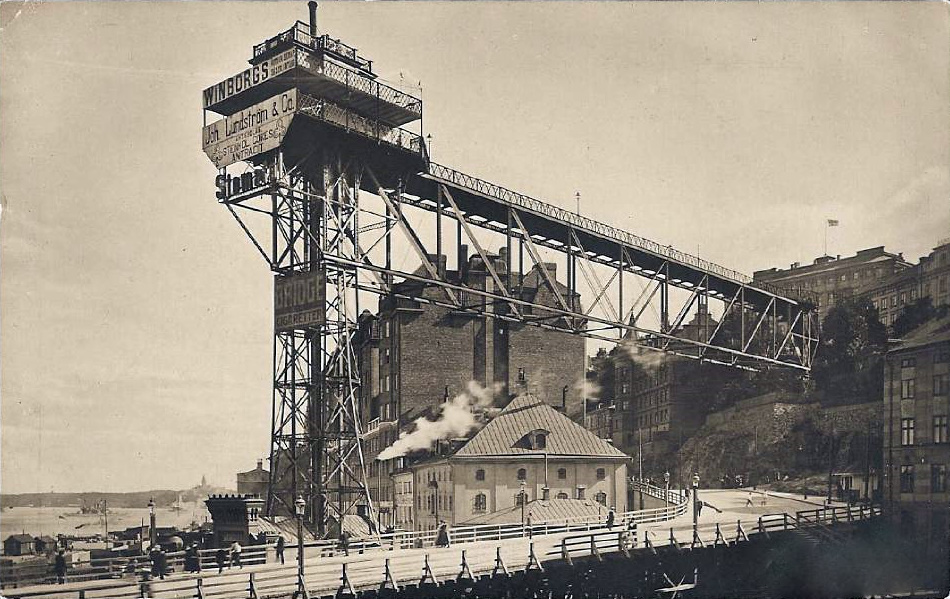 Den gamla ångdrivna Katarinahissen i början av 1900-talet. Bilden är tagen efter 1909, eftersom Stomatolskylten är på plats på hissen.